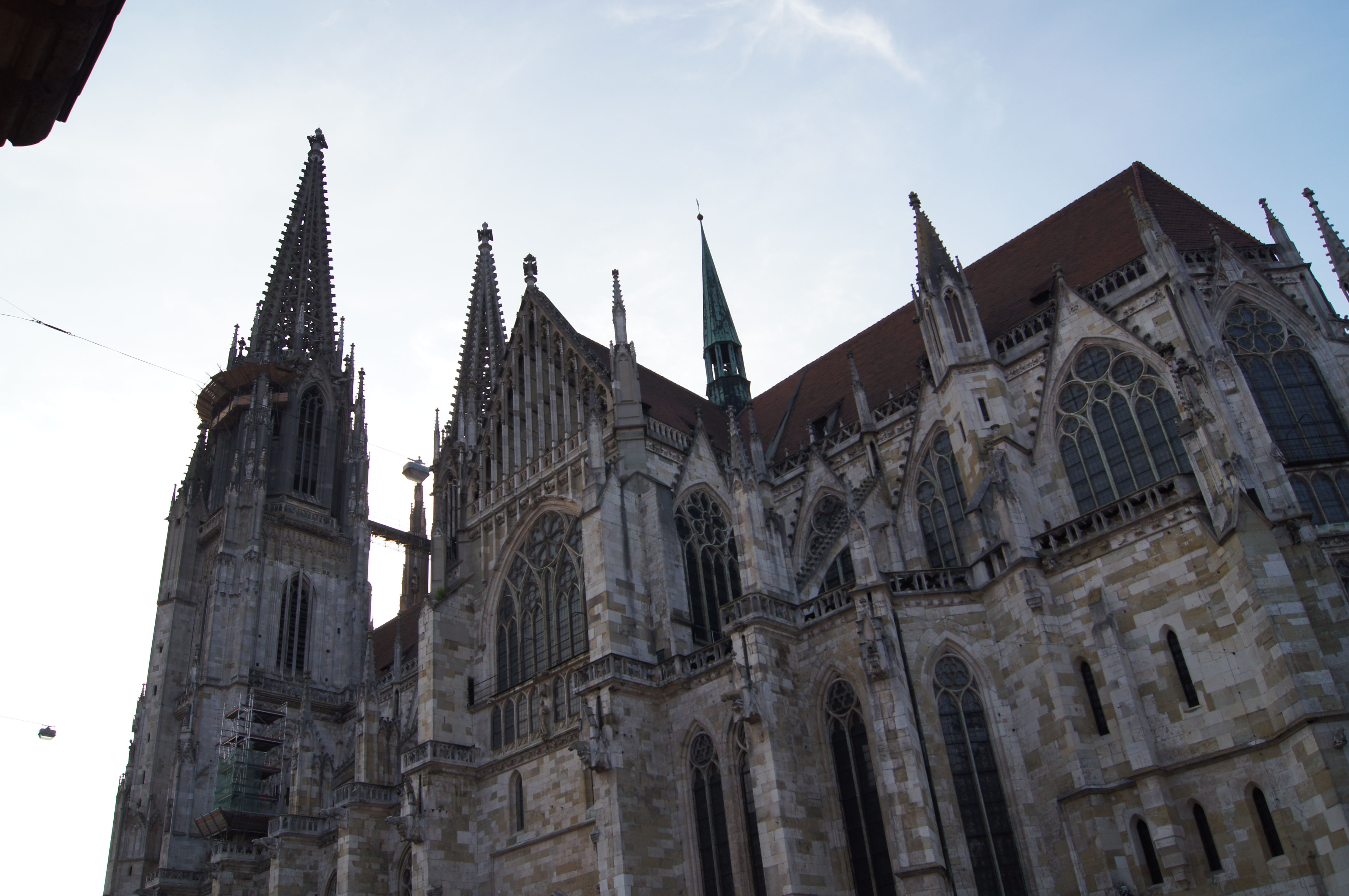 Dom in Regensburg, Bayern, Deutschland